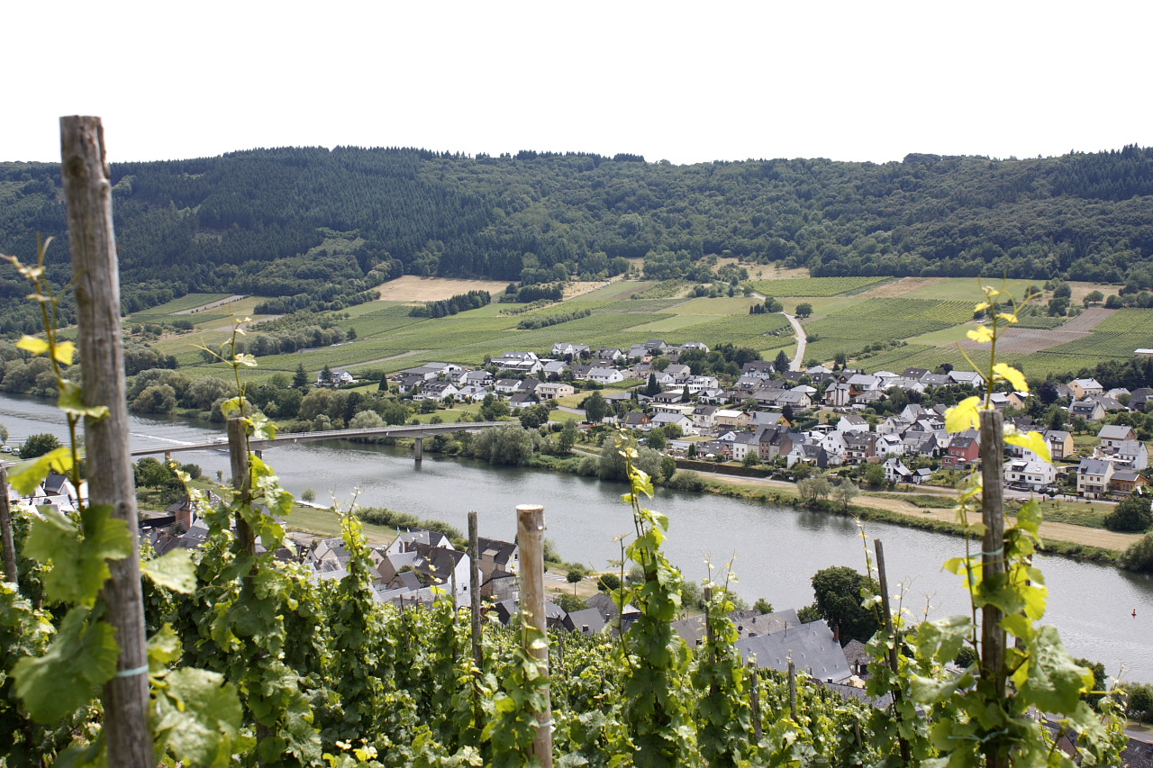 Wirtschaftsbrücke Kinheim-Kindel 2014